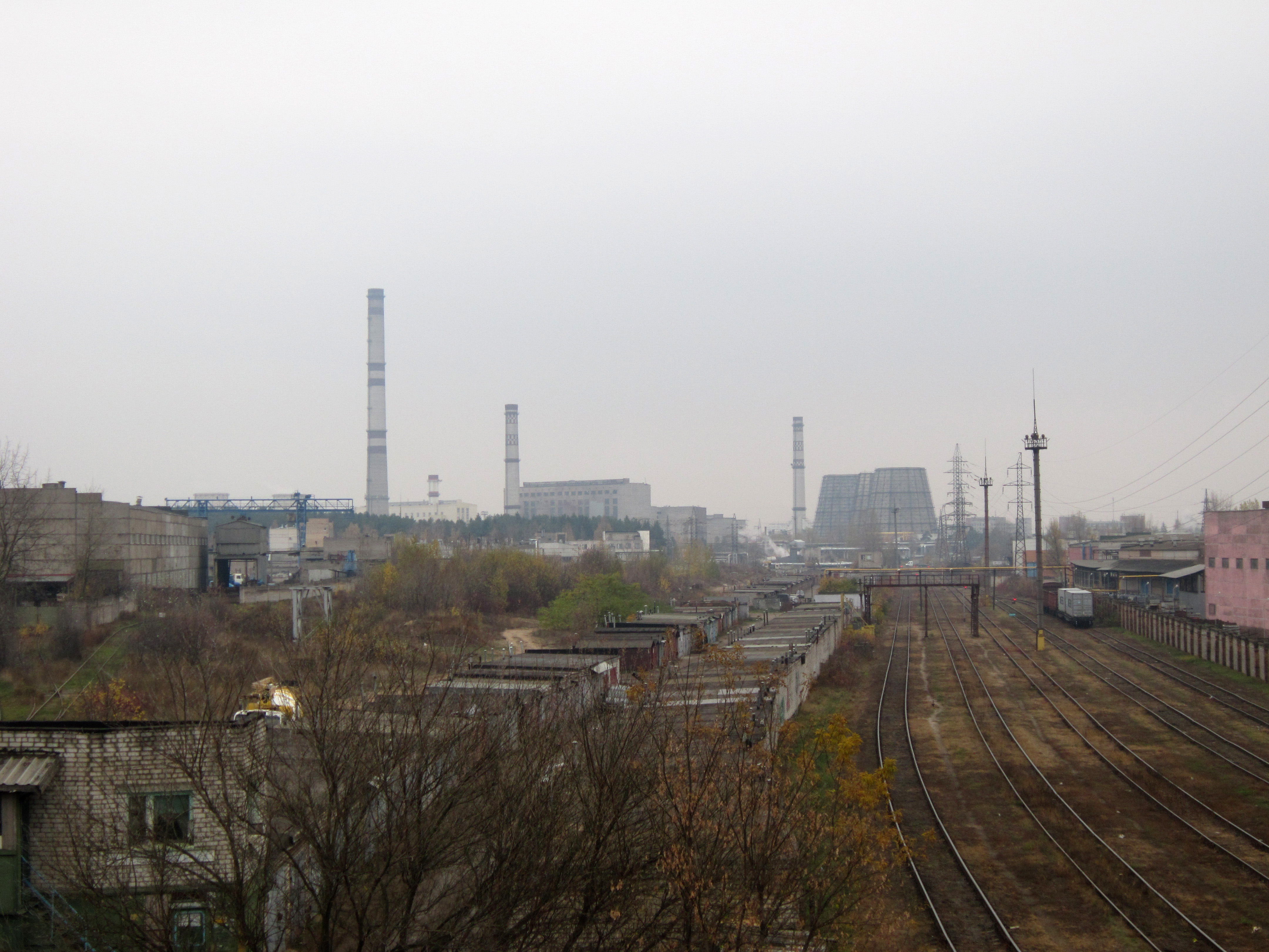 ТЭЦ-3 в Минске